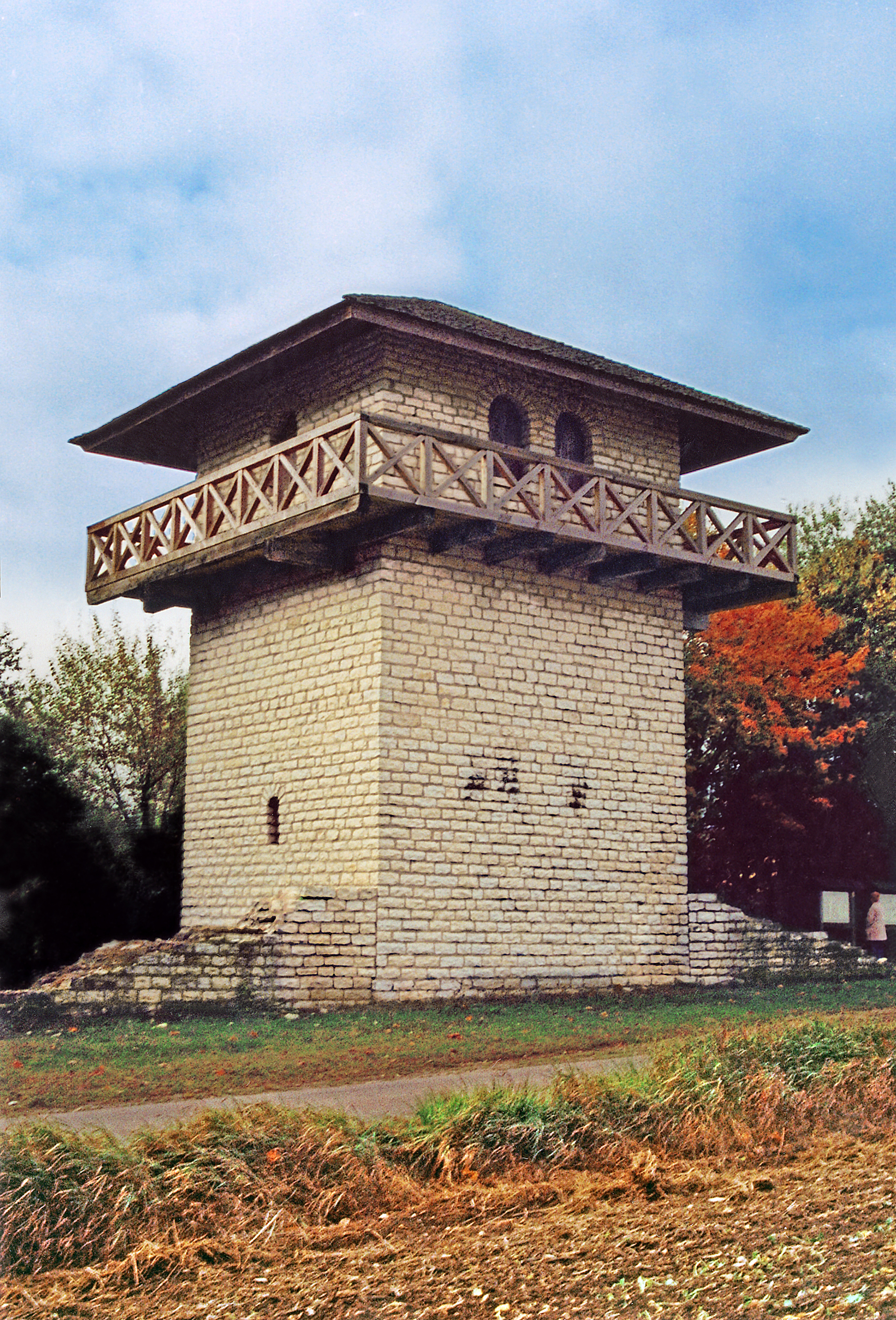 1992 rekonstruierter Limeswachturm an der nur vermuteten Turmstelle Wp 14/63 bei Erkertshofen, Markt Titting, Bayern.